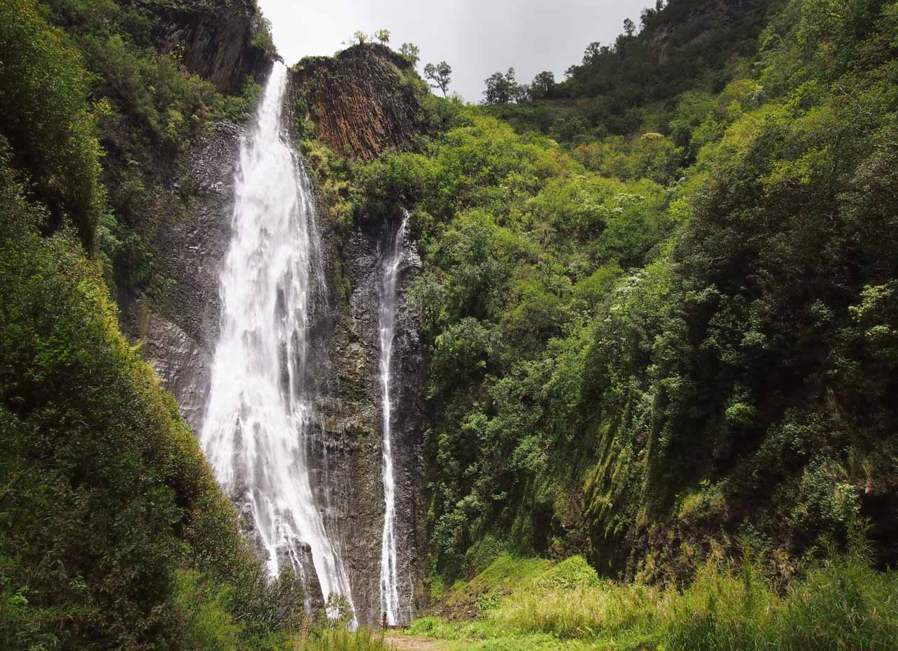 sanfranciscoblog.photo